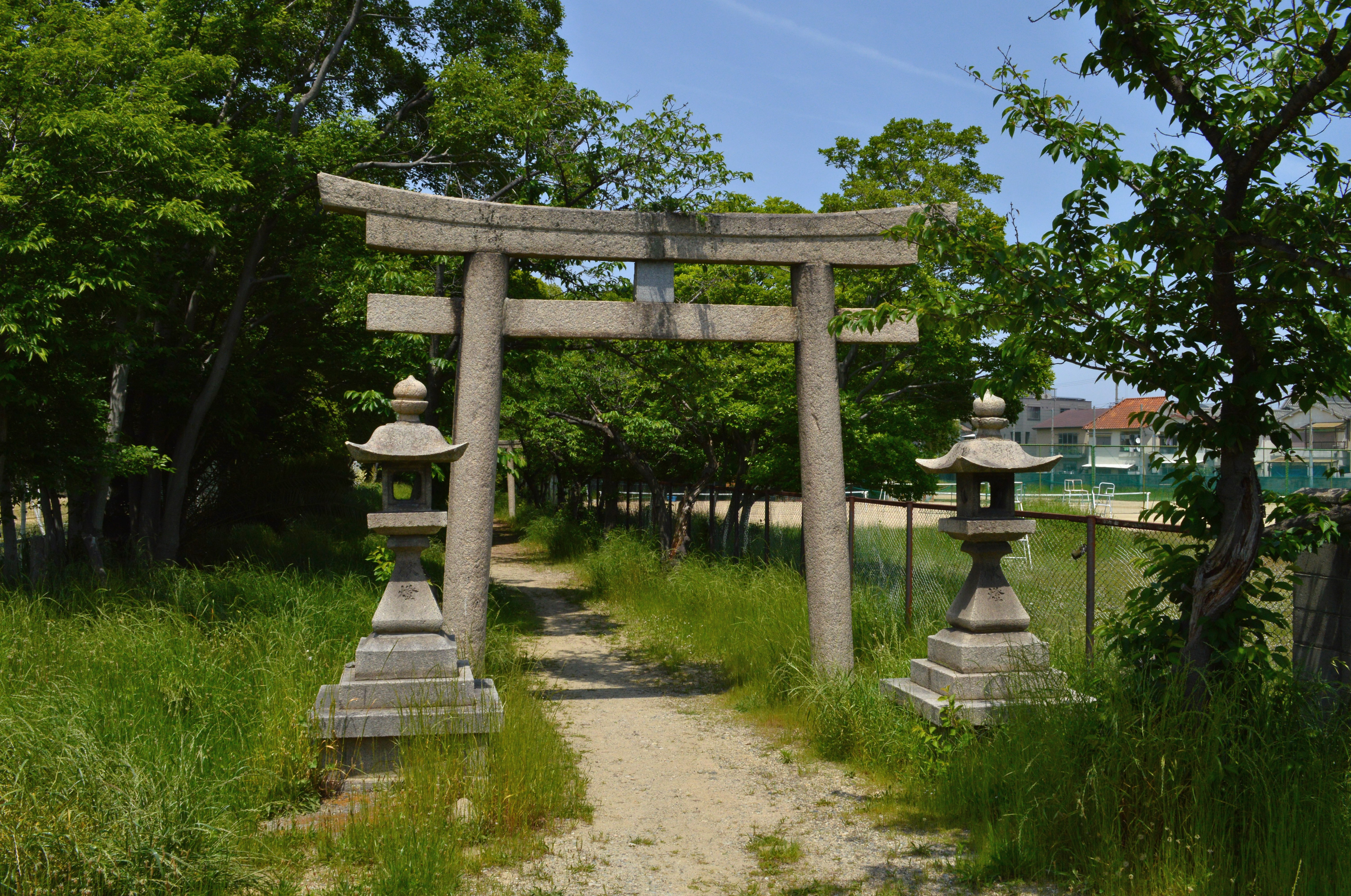 大依羅神社 南鳥居